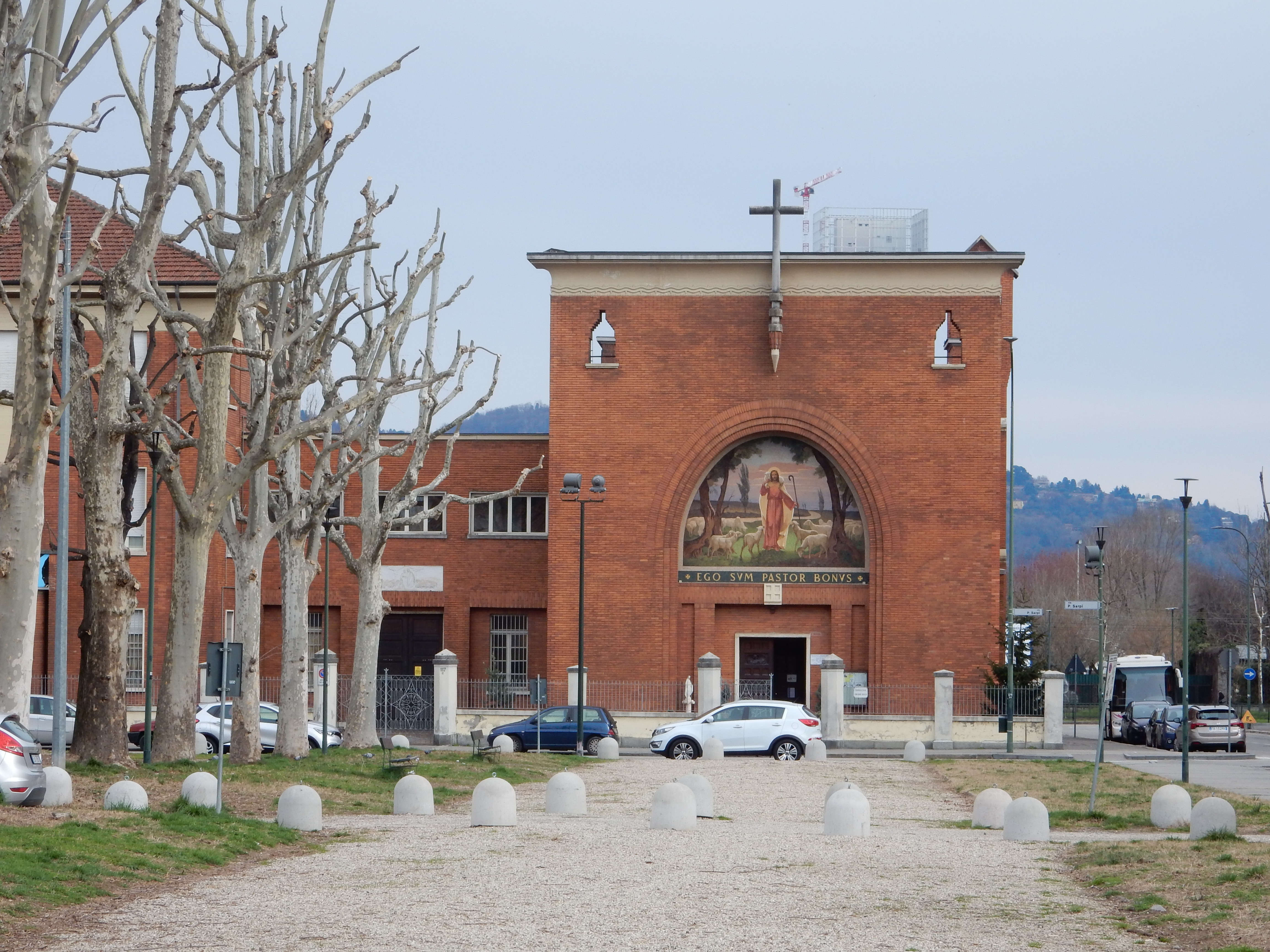 Chiesa Santissimo Spirito